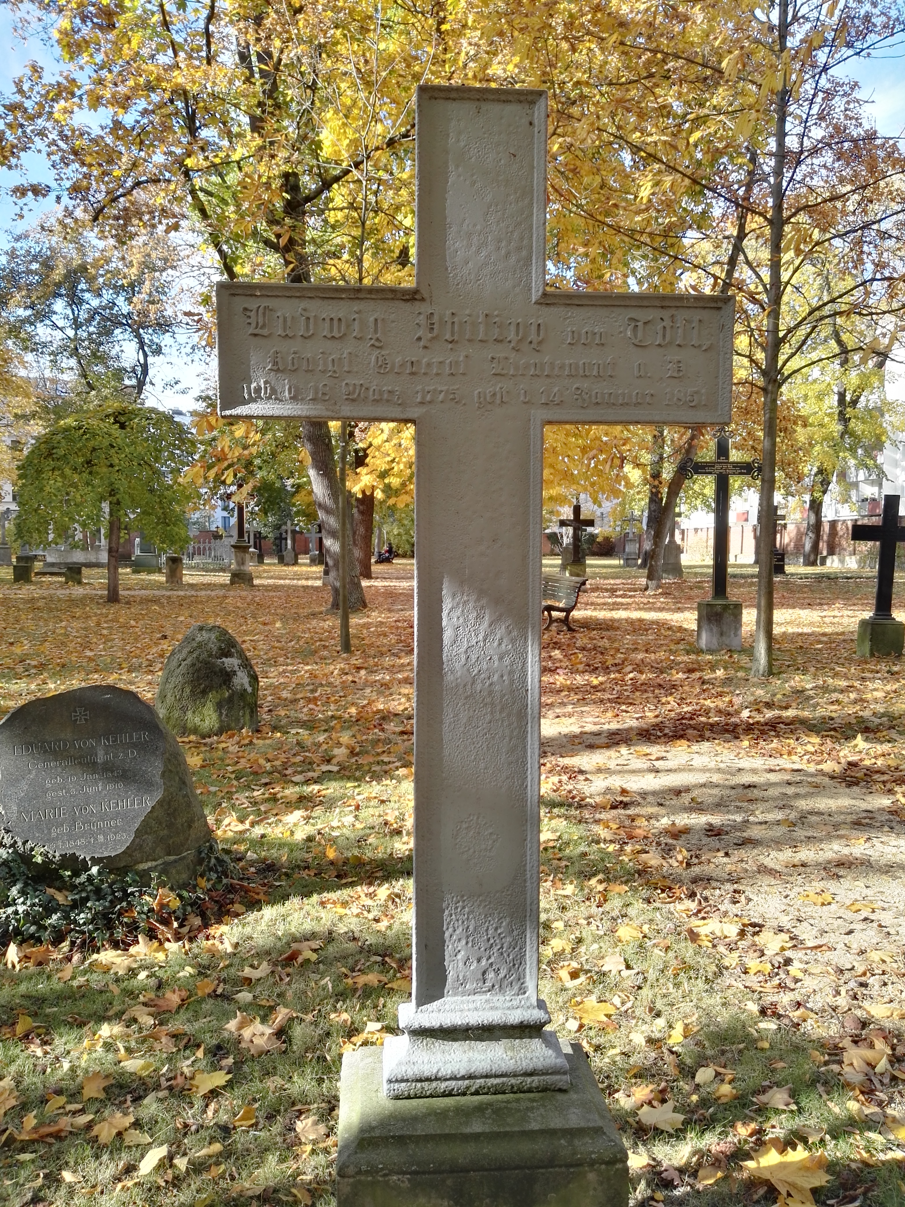 Grab von Ludwig Ernst Philipp von Toll auf dem Alten Garnisonfriedhof in Berlin-Mitte